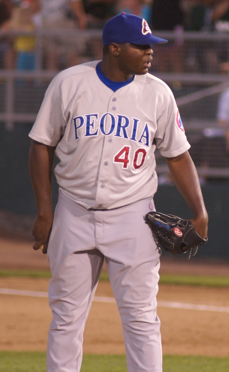 José Ceda